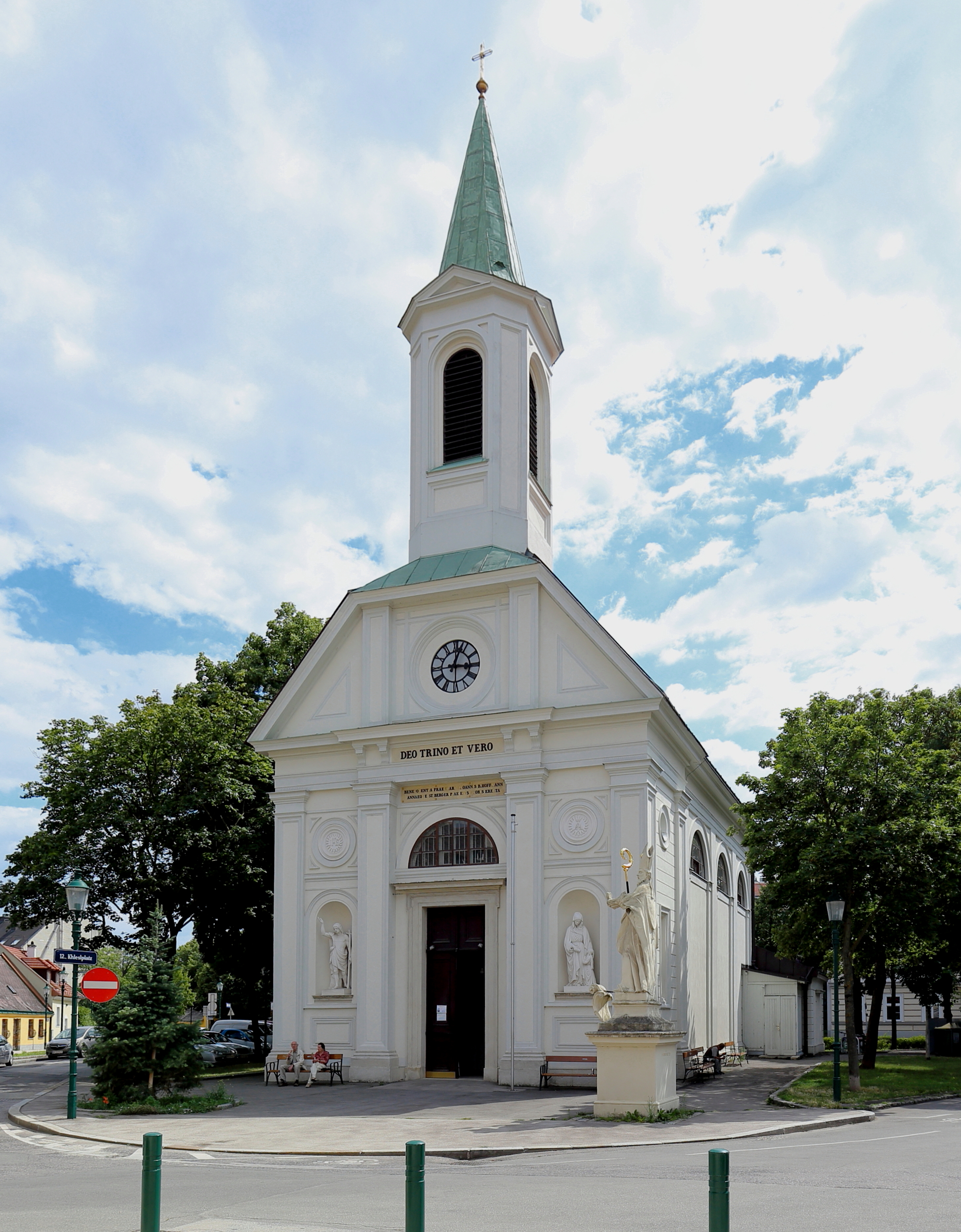 Die Pfarrkirche hl. Oswald am Khleslplatz in Altmannsdorf, ein Bezirksteil des 12. Wiener Gemeindebezirkes Meidling.Die einschiffige Kirche mit geradem Chorabschluss wurde in den Jahren 1838/39 nach den Plänen des Architekten Franz Lößl errichtet. Die Statuen an der Portalfassade stellen die Namenspatrone (Johannes der Täufer und Anna) der Kirchenstifter Johann Baptist Hoffmann und seine Gattin Anna Stiberger dar.